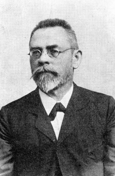 Richard Trampler, profesor, autor klasické monografie o Macoše, zajímal se o Moravský kras